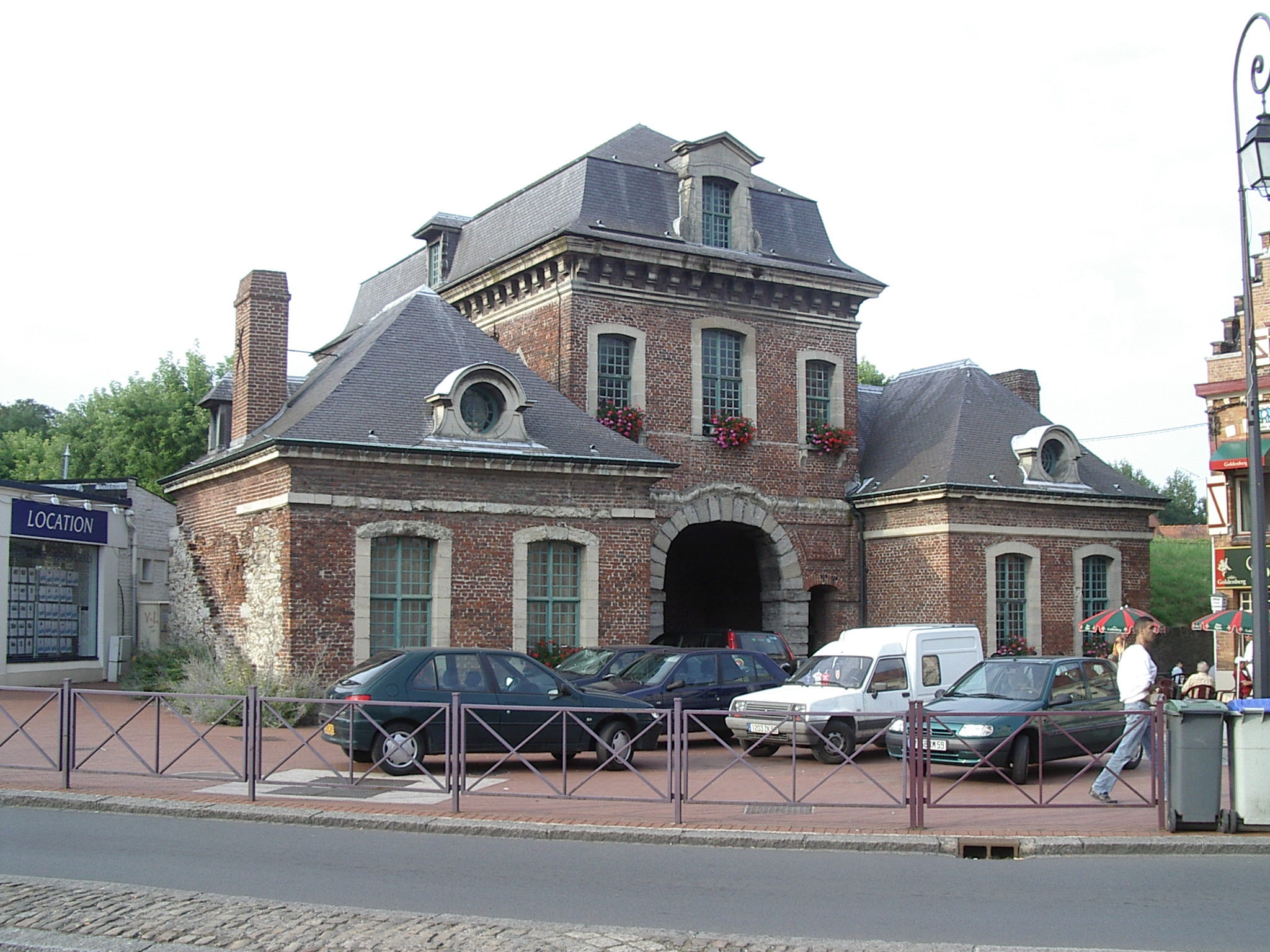 Porte Vautourneux (17e siècle) à Condé-sur-l'Escaut